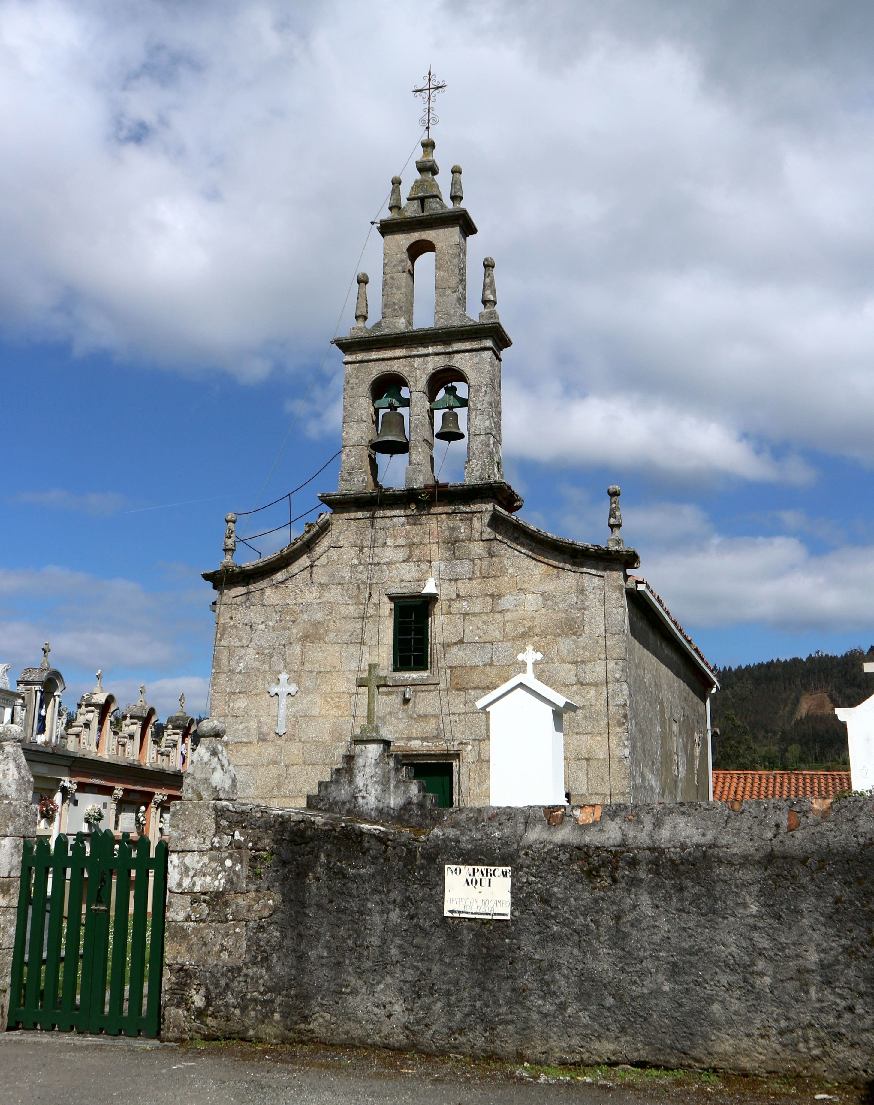 Igrexa de Santa María da Regueira. A Regueira, Oza-Cesuras